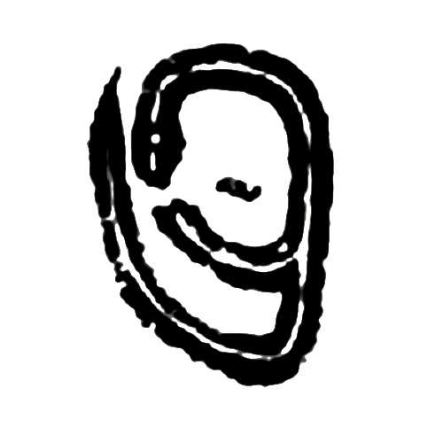 Plan Hünenburg im Barbruch von Hölzermann